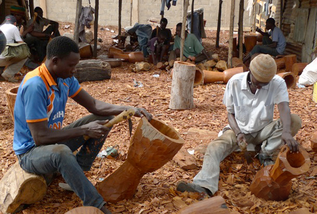 Artesanos produciendo Yembés en el mercado de Brikama